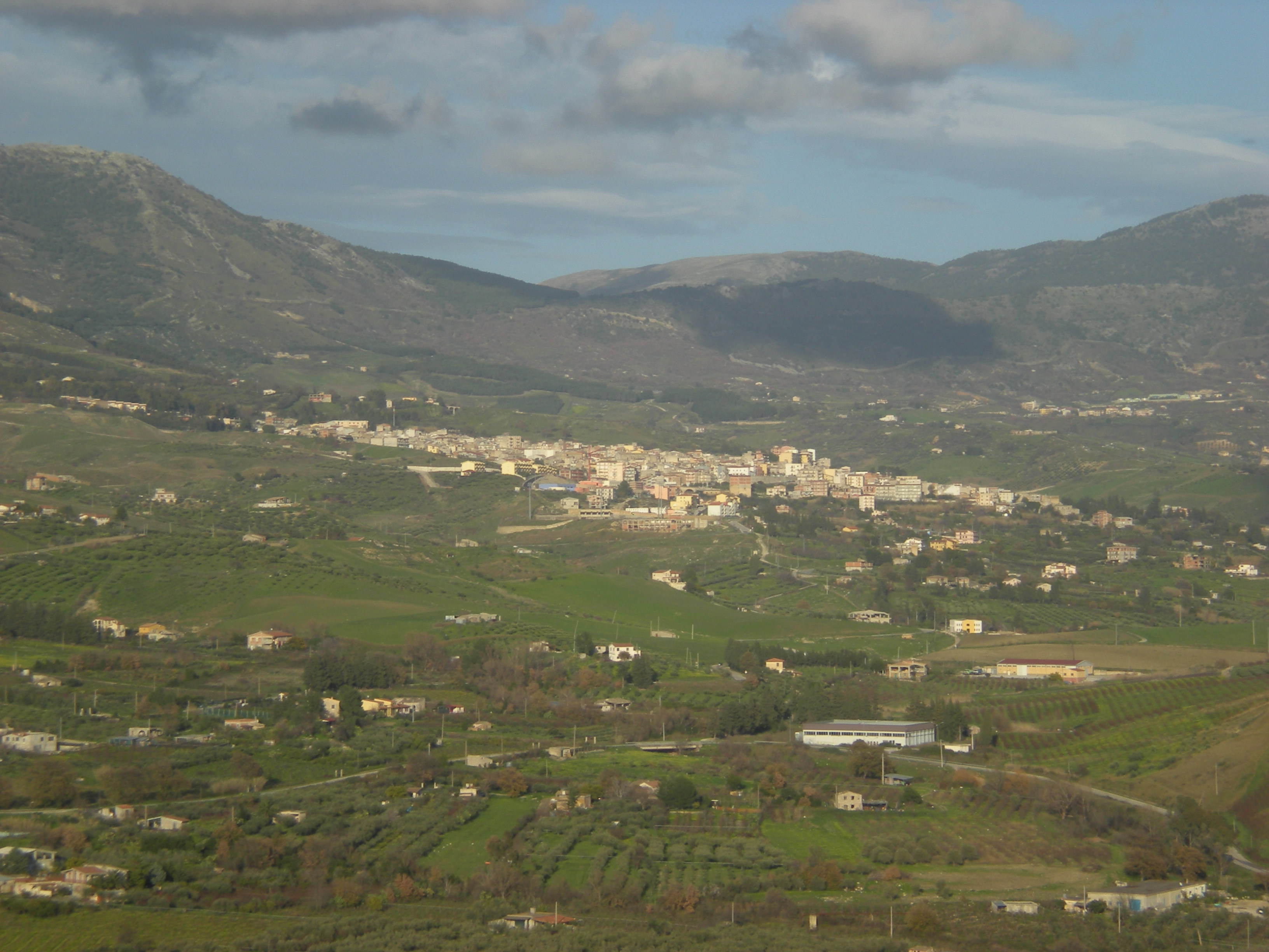 Bivona